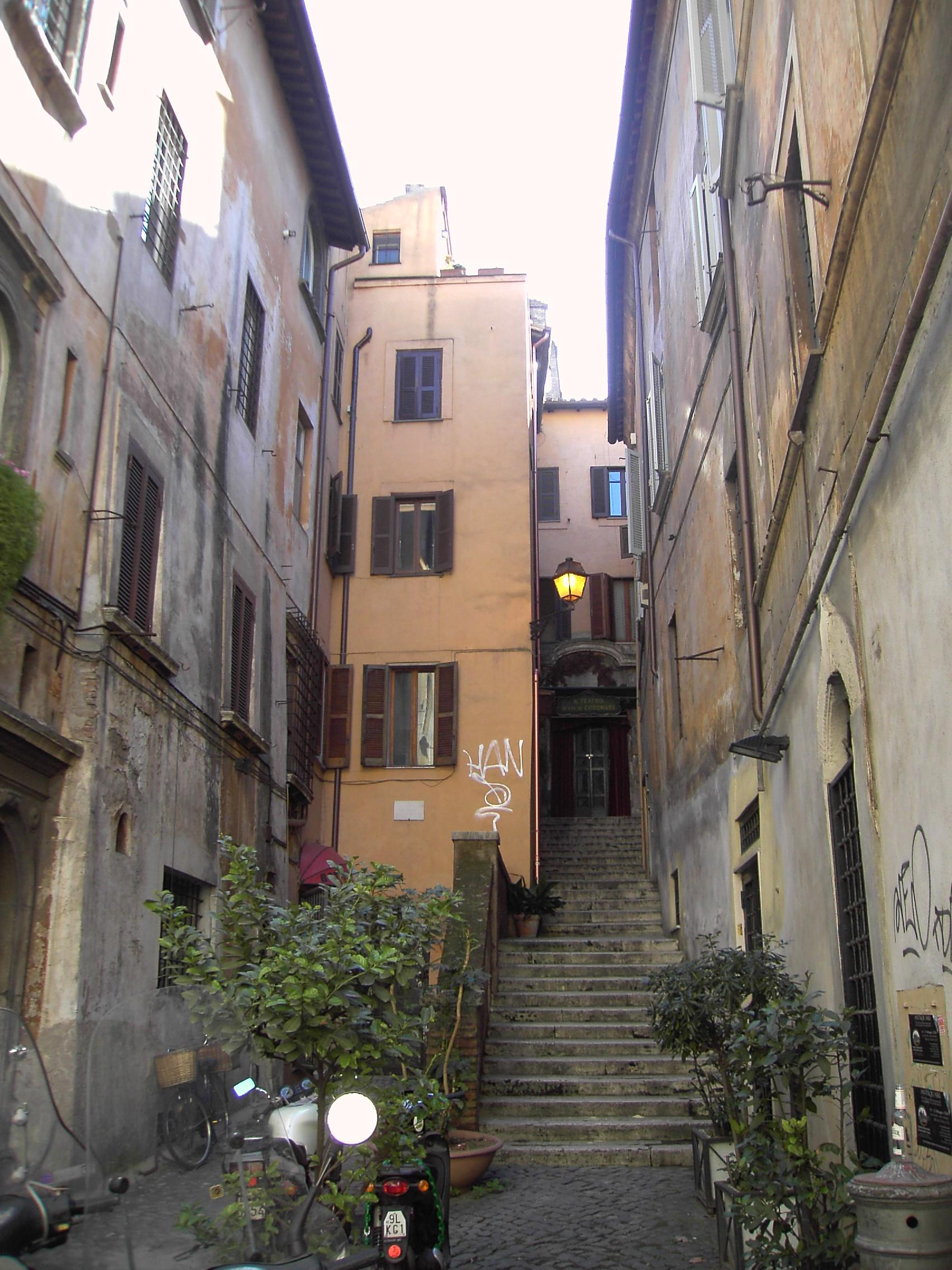 Roma, vicolo san Simone.